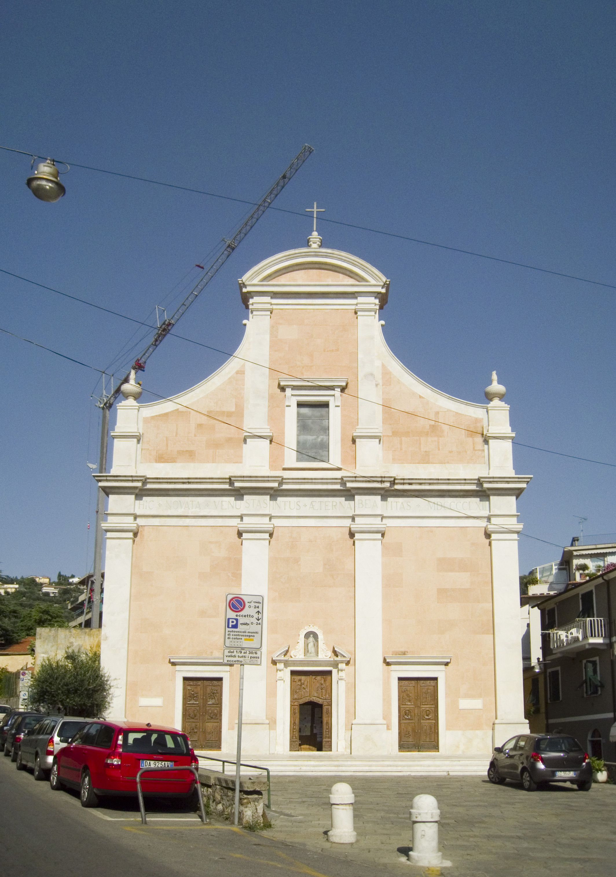 Ma première église italienne des vacances : San Francesco d'Assisi à Lerici. J'en verrai bien d'autres.